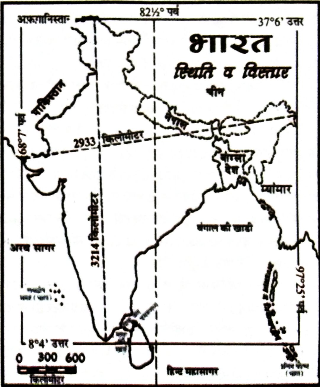 भारत स्थिति व विस्तार